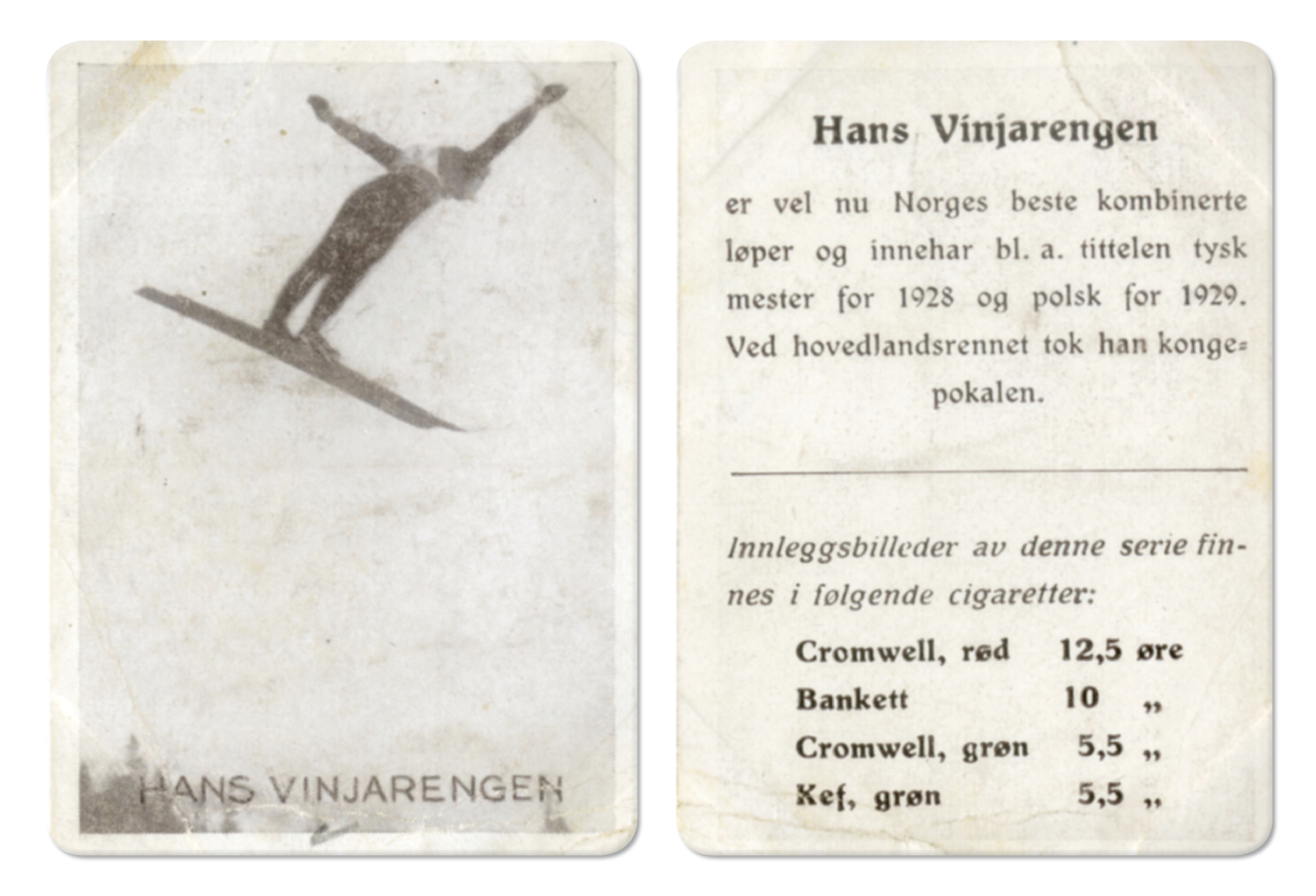 Format: Samlekort Dato / Date: ca. 1930 (dokumentet) Fotograf / Photographer: Ukjent Eier / Owner Institution: Trondheim byarkiv, The Municipal Archives of Trondheim Arkivreferanse / Archive reference: Sportsklubben Freidig: Sigarettfoto ca. 1930 (Løpenr. 75) F23931 Wikipedia: Hans Vinjarengen (1905 - 1984) Tekst på baksiden: Hans Vinjarengen er vel nu Norges beste kombinerte løper og innehar bl. a. tittelen tysk mester for 1928 og polsk for 1929. Ved hovedlandsrennet tok han kongepokalen. Merknad: Disse samlekortene med bilder av norske og internasjonale idretthelter fulgte med i sigarettpakker på 1920 og 30-tallet - derav tobakksreklamen på baksiden. Samlekortene kommer fra Sportsklubben Freidigs arkiv, og inneholder nærmere 90 unike kort pent plassert i et samlealbum. Samleren var den senere skipsmegler Finn Følling (1914 – 1985).